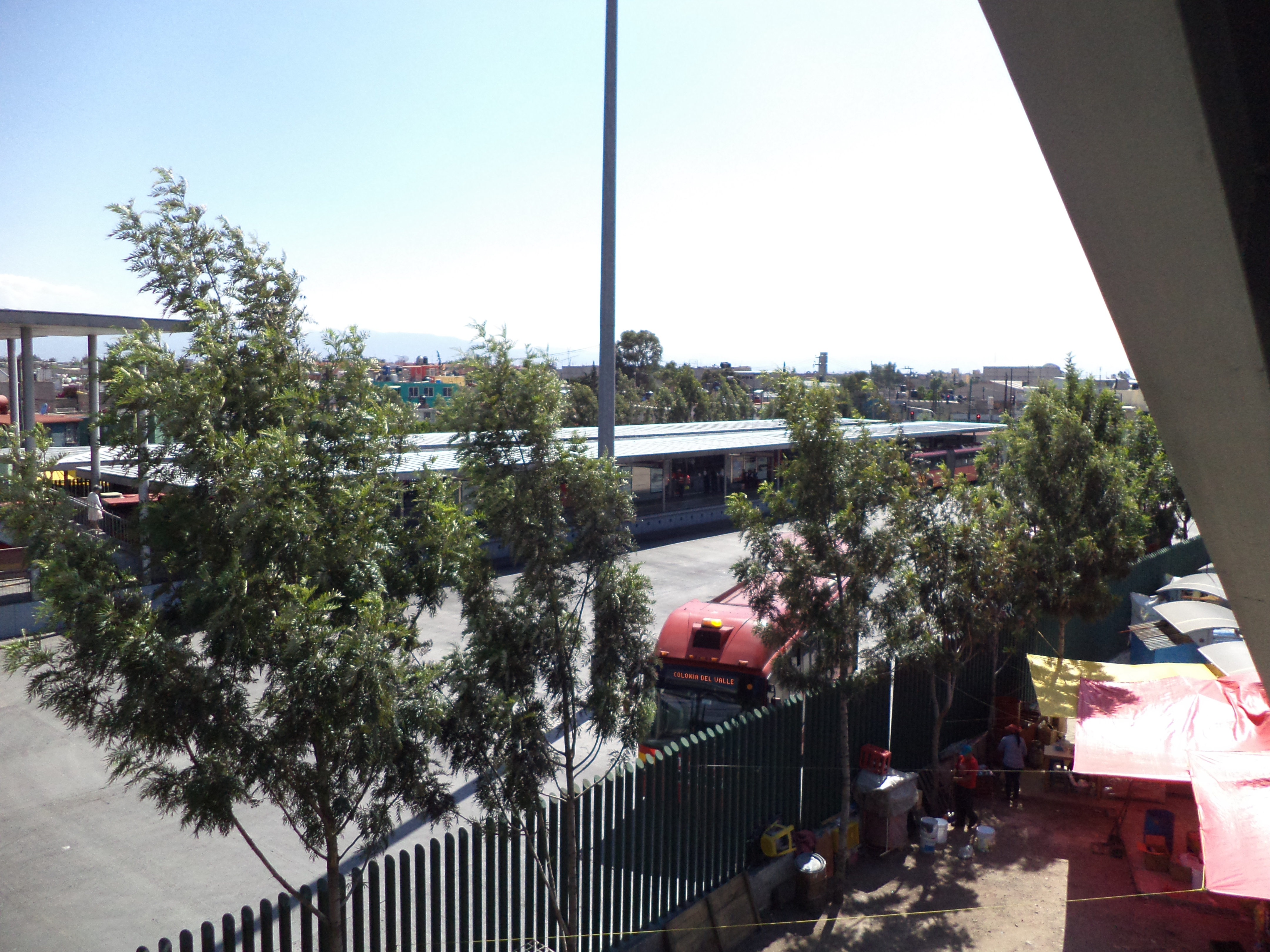 Estación Tepalcates